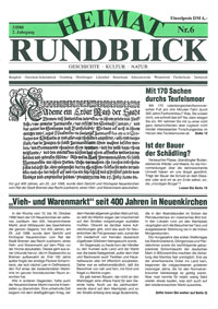 Titelseite der deutschen Regional- und Kulturzeitschrift Heimat-Rundblick (ISSN 2191-4257), 2. Jahrgang, Heft Nr. 6 (3/1988) vom 3. Quartal 1988.